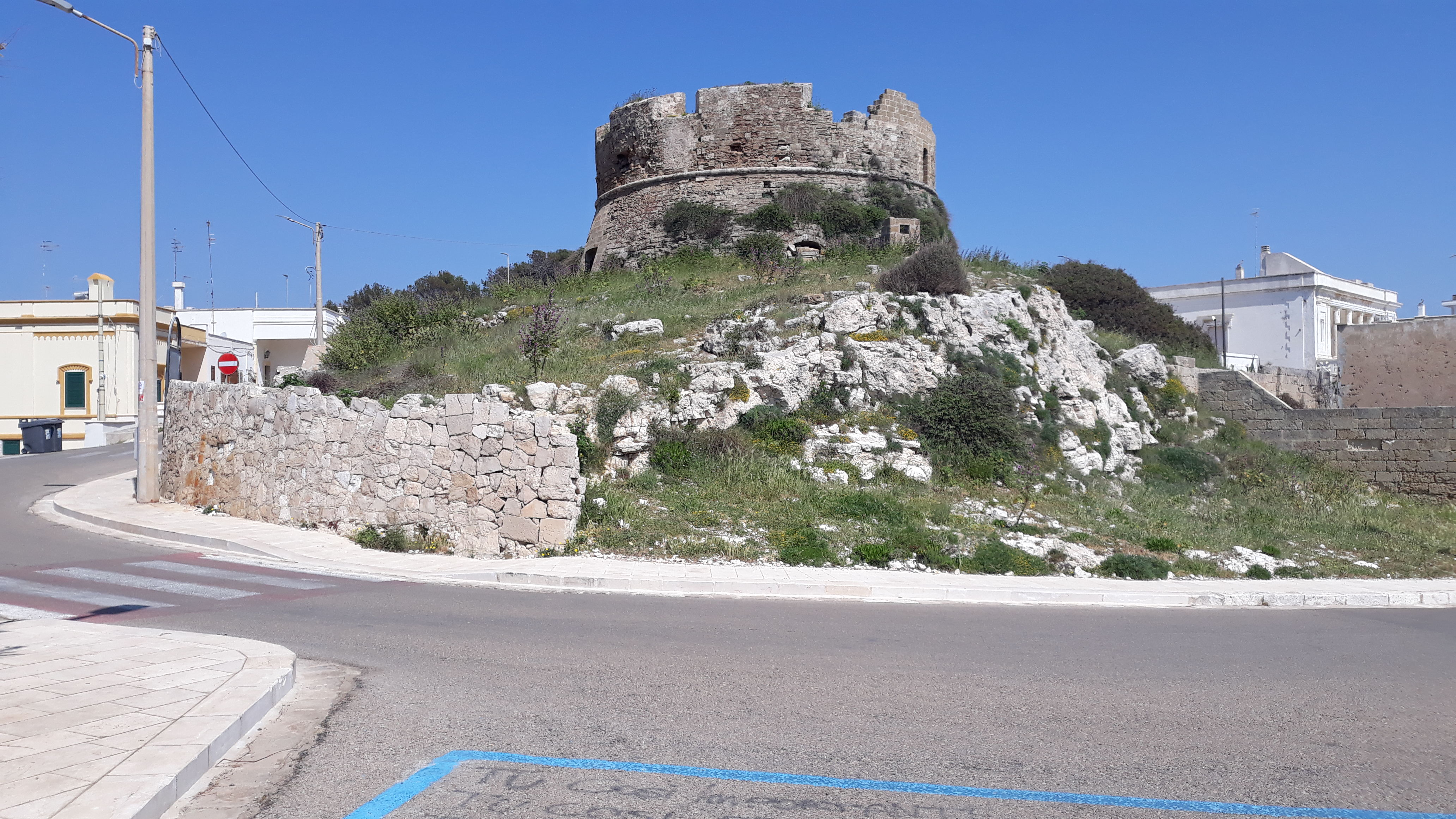 Torre Domini Morti vista da sud, località Leuca, Comune di Castrignano del Capo